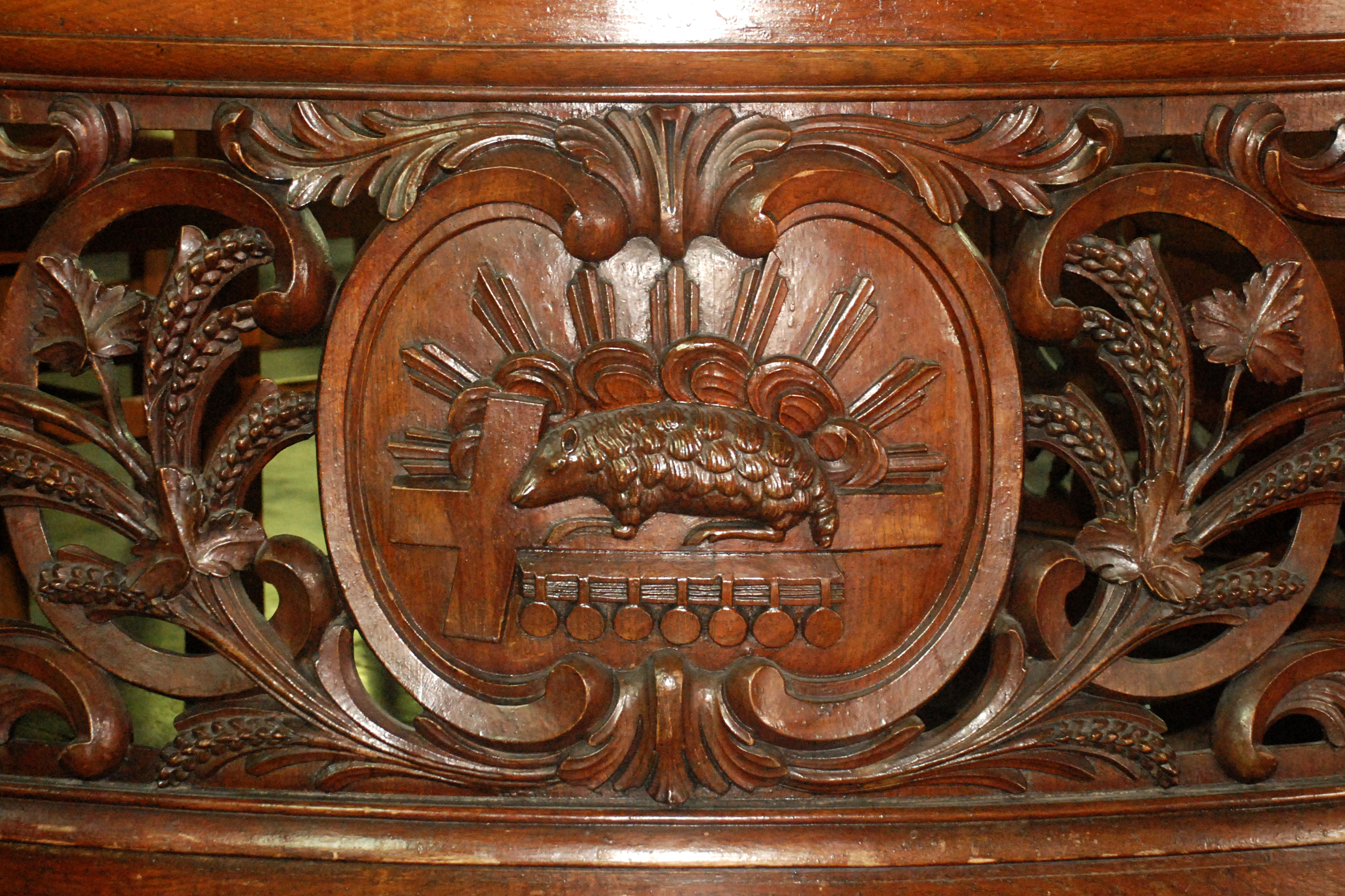 Belgique - Brabant wallon - Église de Court-Saint-Étienne